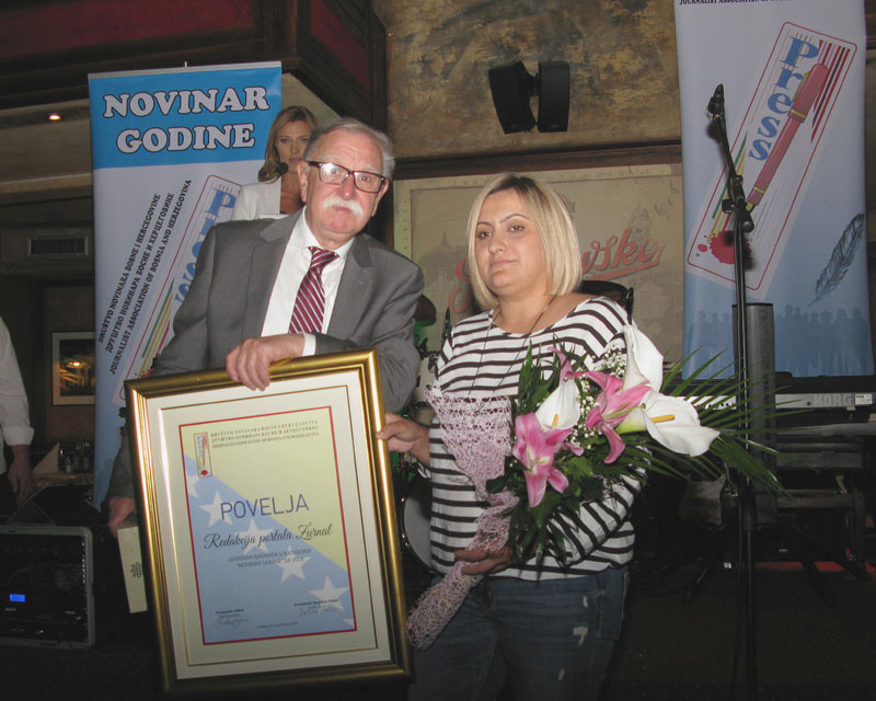 Uručenje priznanja Novinar godine portalu Žurnal.info